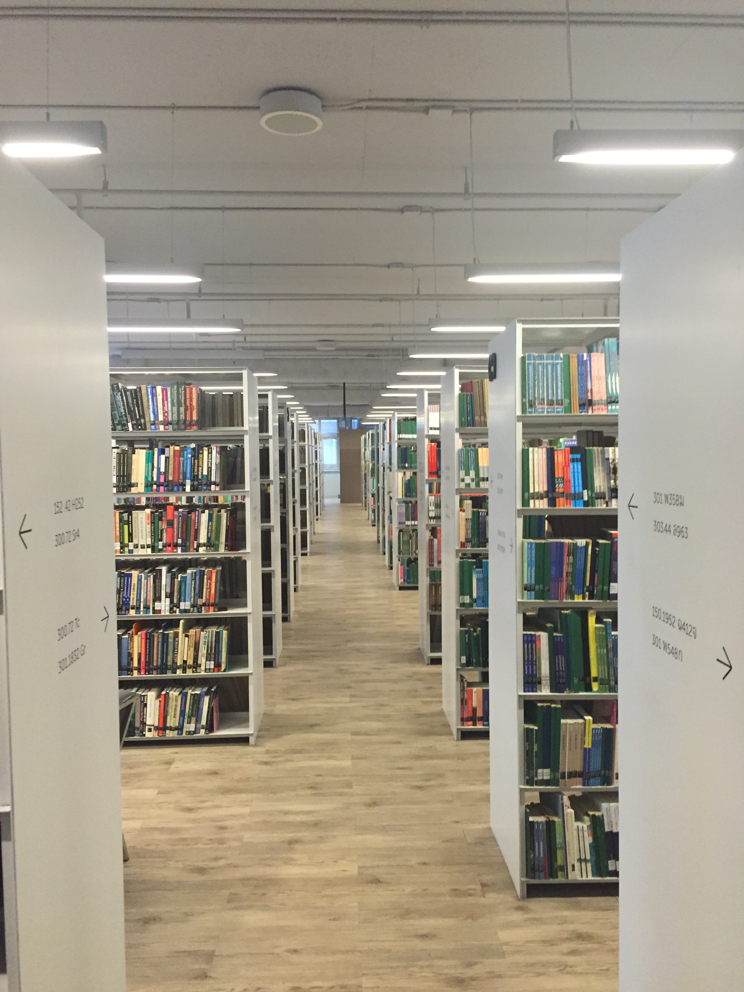 ภายในห้องสมุดคณะรัฐศาสตร์ จุฬาฯ